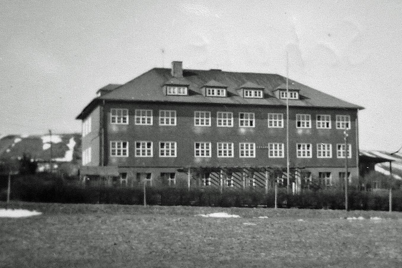 Friedrich-Fröbel-Oberschule Oberweißbach (Aufnahme von 1957, mit Kamera Pouva Start)